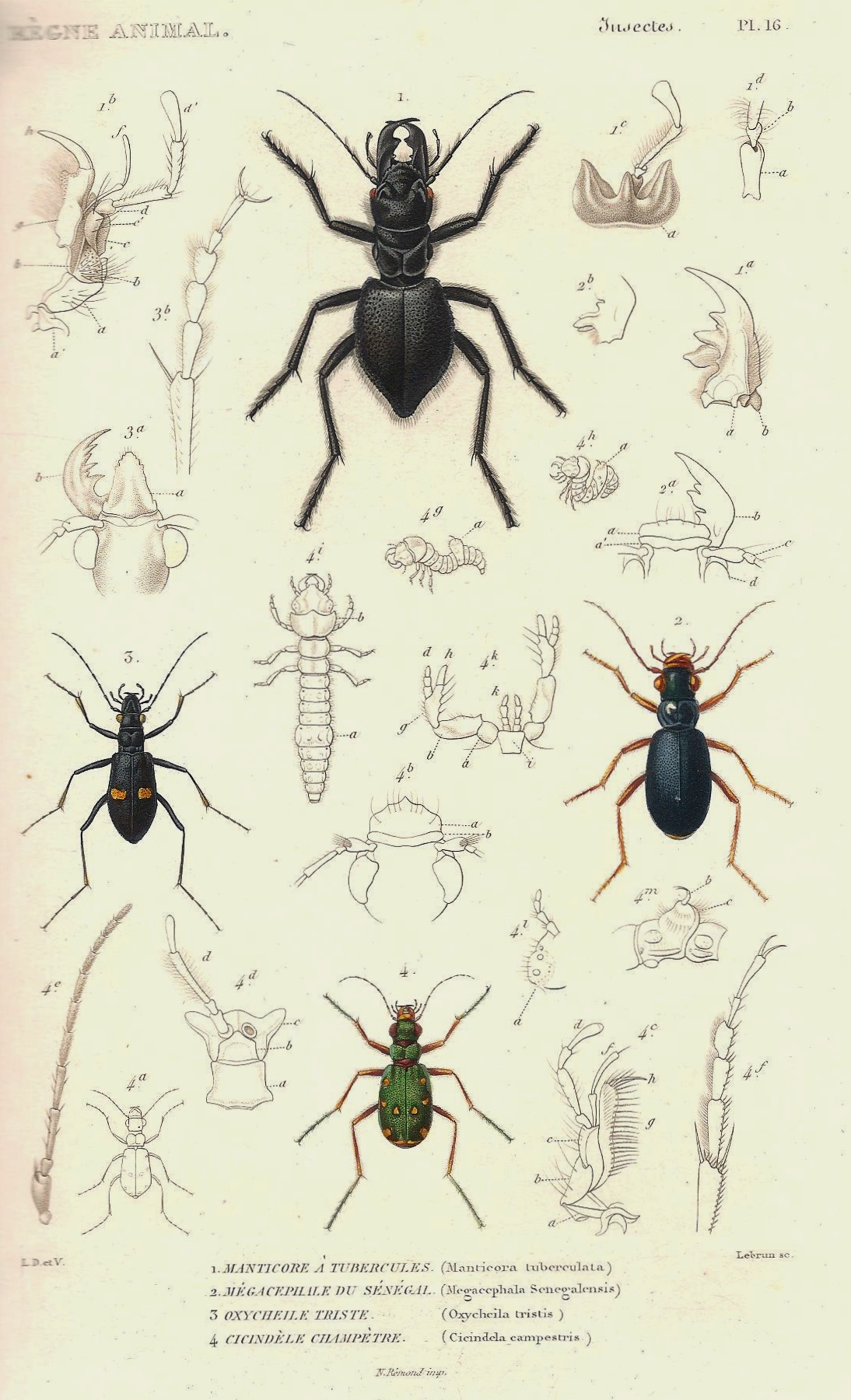 En haut : Manticore (Manticora tuberculata) au milieu : à gauche Oxycheile triste et à droite Mégacéphale (Megacephala) en bas : Cicindèle champètre (Cicindela campestris) Planche N° 16 du volume 12 du livre "le Règne animal distribué d'après son organisation" par Georges Cuvier, deuxième édition (1828).